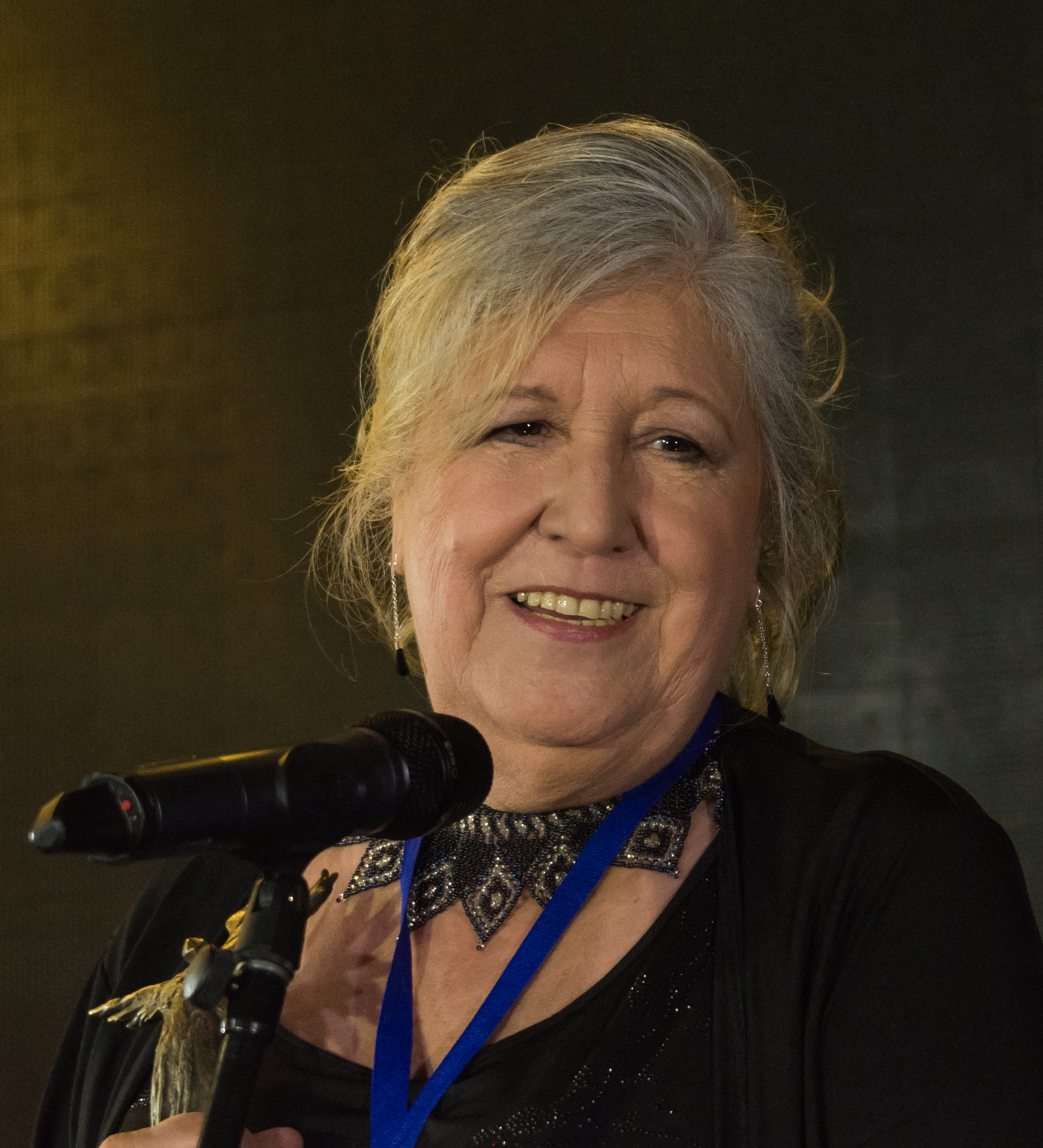 Ana Reeves, Premios Caleuche, Teatro Oriente, Providencia, Santiago, Región Metropolitana de Santiago, Chile.